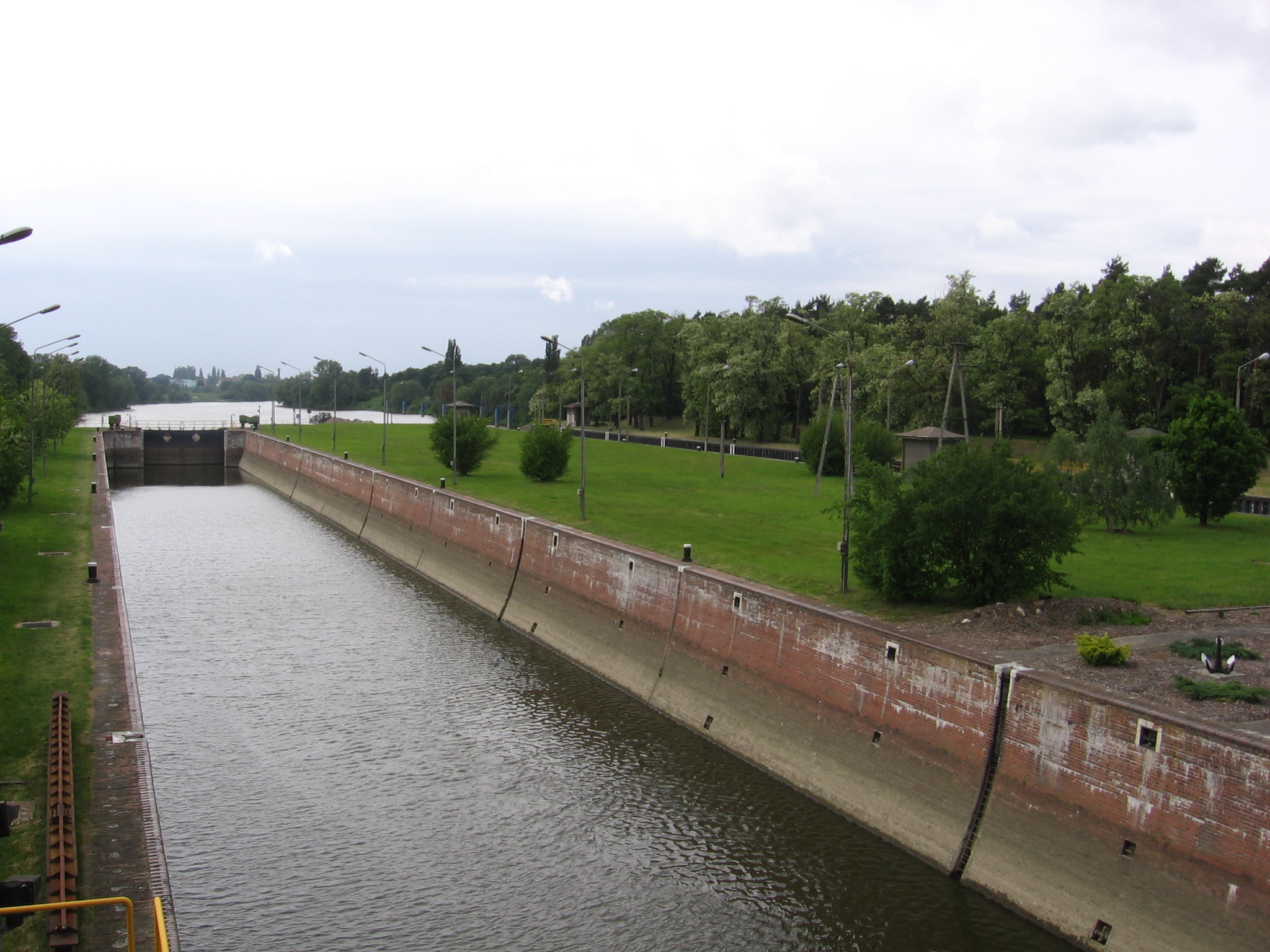 Rędzin sluices in Wrocław, Poland